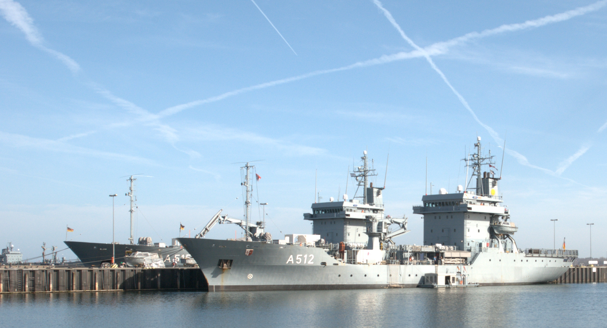 Einsatzgruppenversorger Mosel A 512 am 23.3.2011 an der Tirpitzmole Kiel